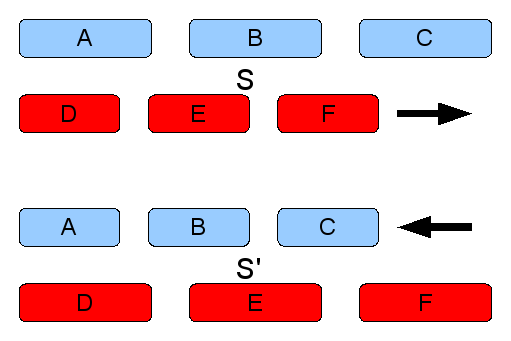 Lorentzkontraktion